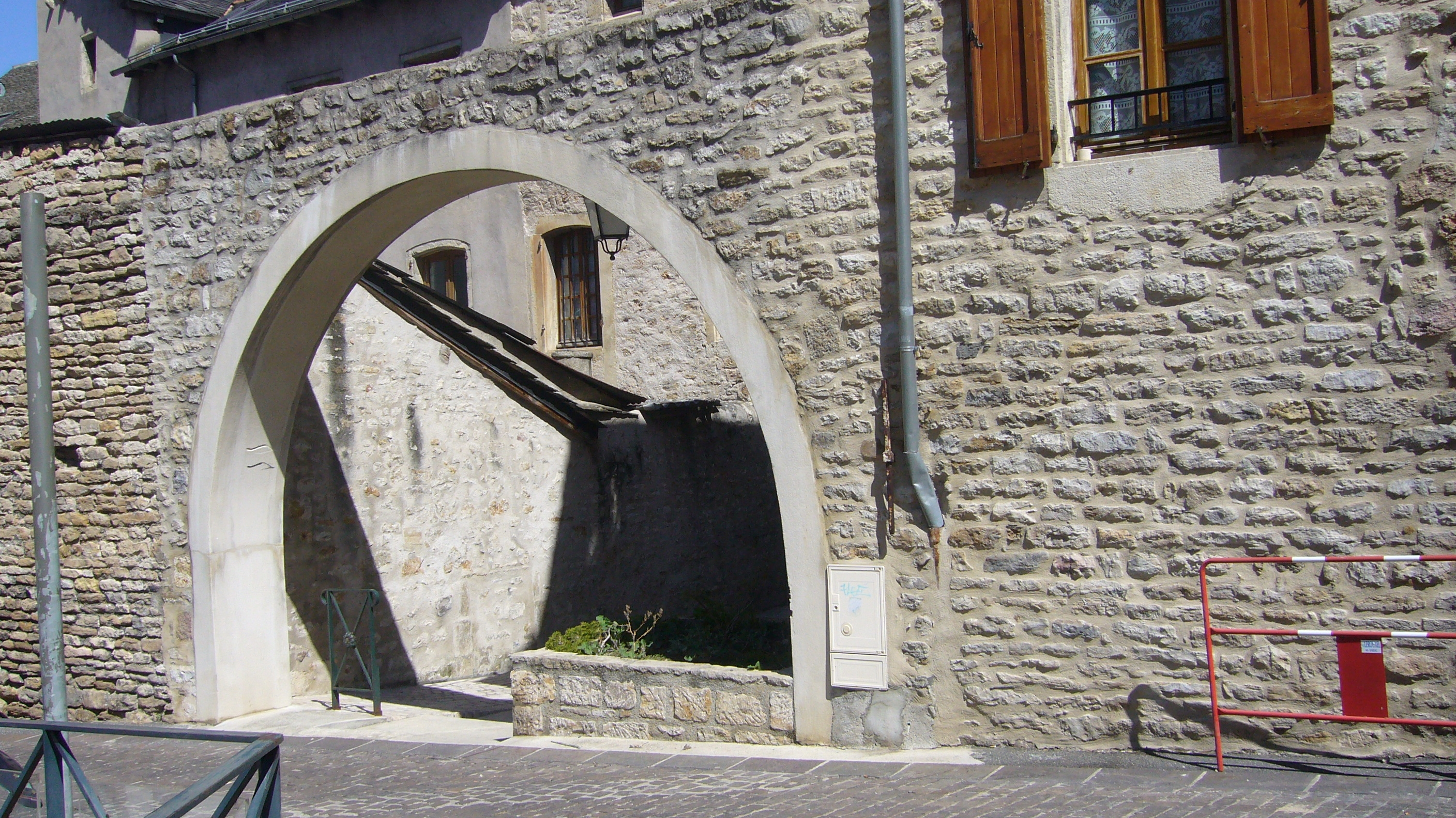 Ancienne synagogue de la ville de Mende, Lozère, France